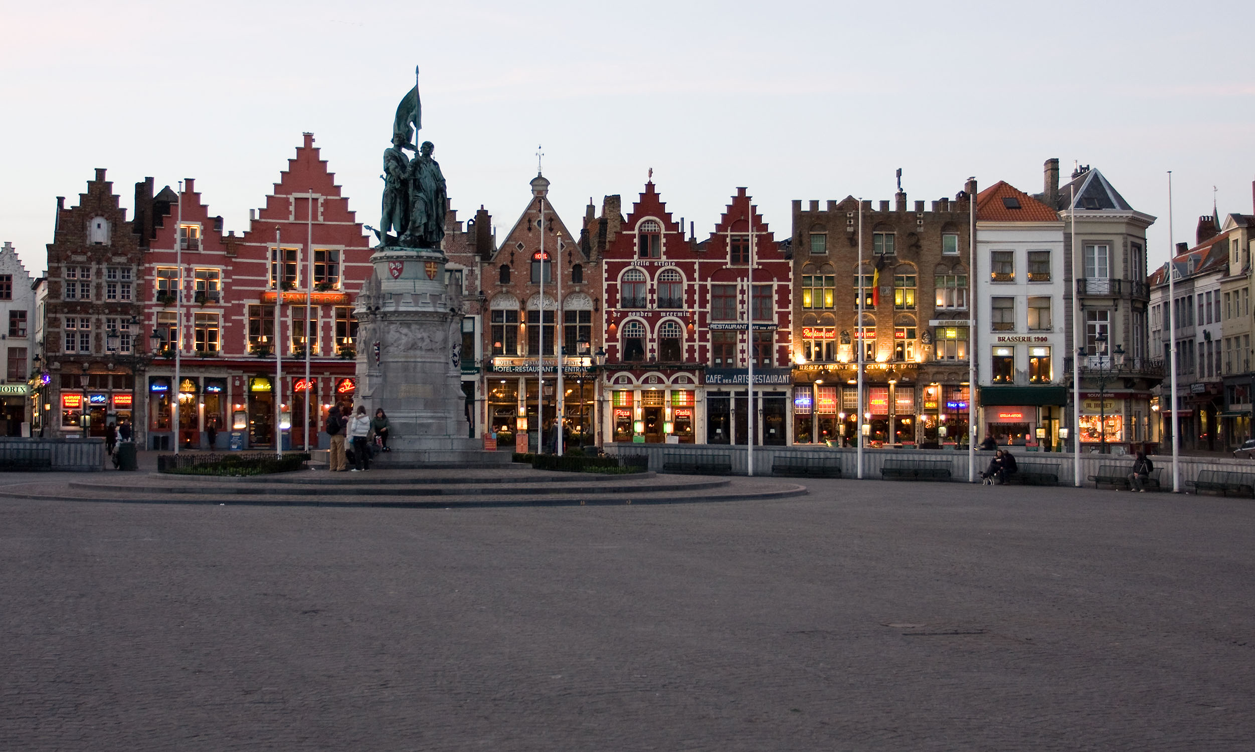 Market Square / Bruges, Belgium